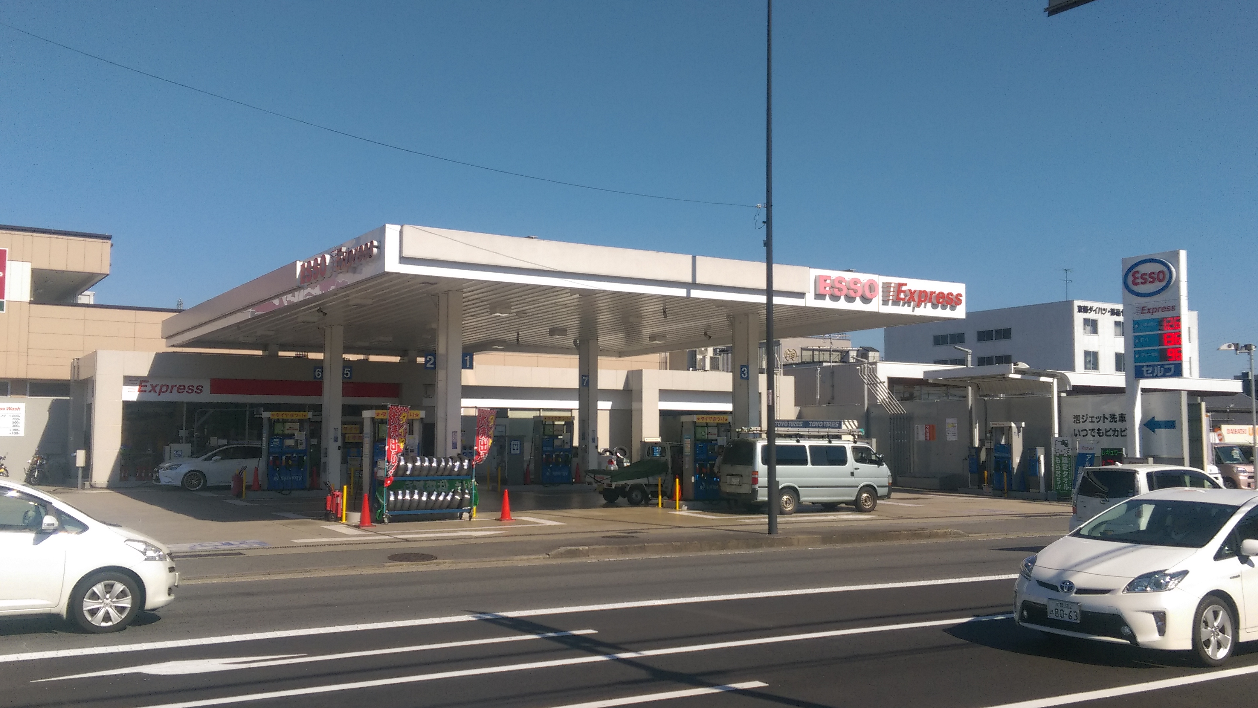 エッソ 木村石油大手筋SS 京都市伏見区